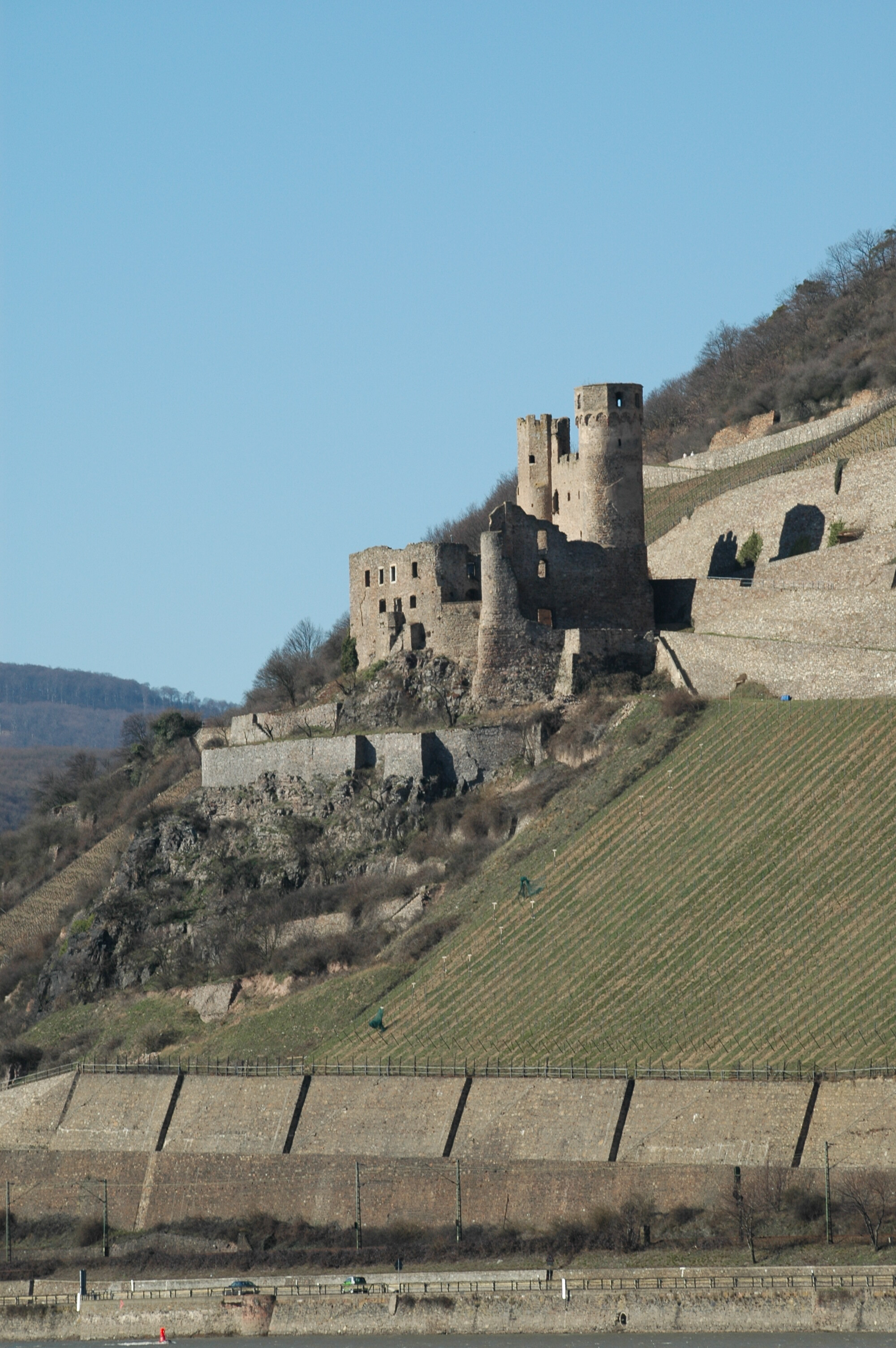 Burg Ehrenfels